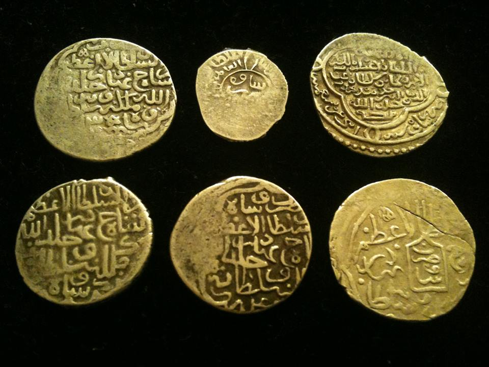 سکه های ضرب ساوه در گذر زمان از مجموعه شخصی شهرام نگارشی